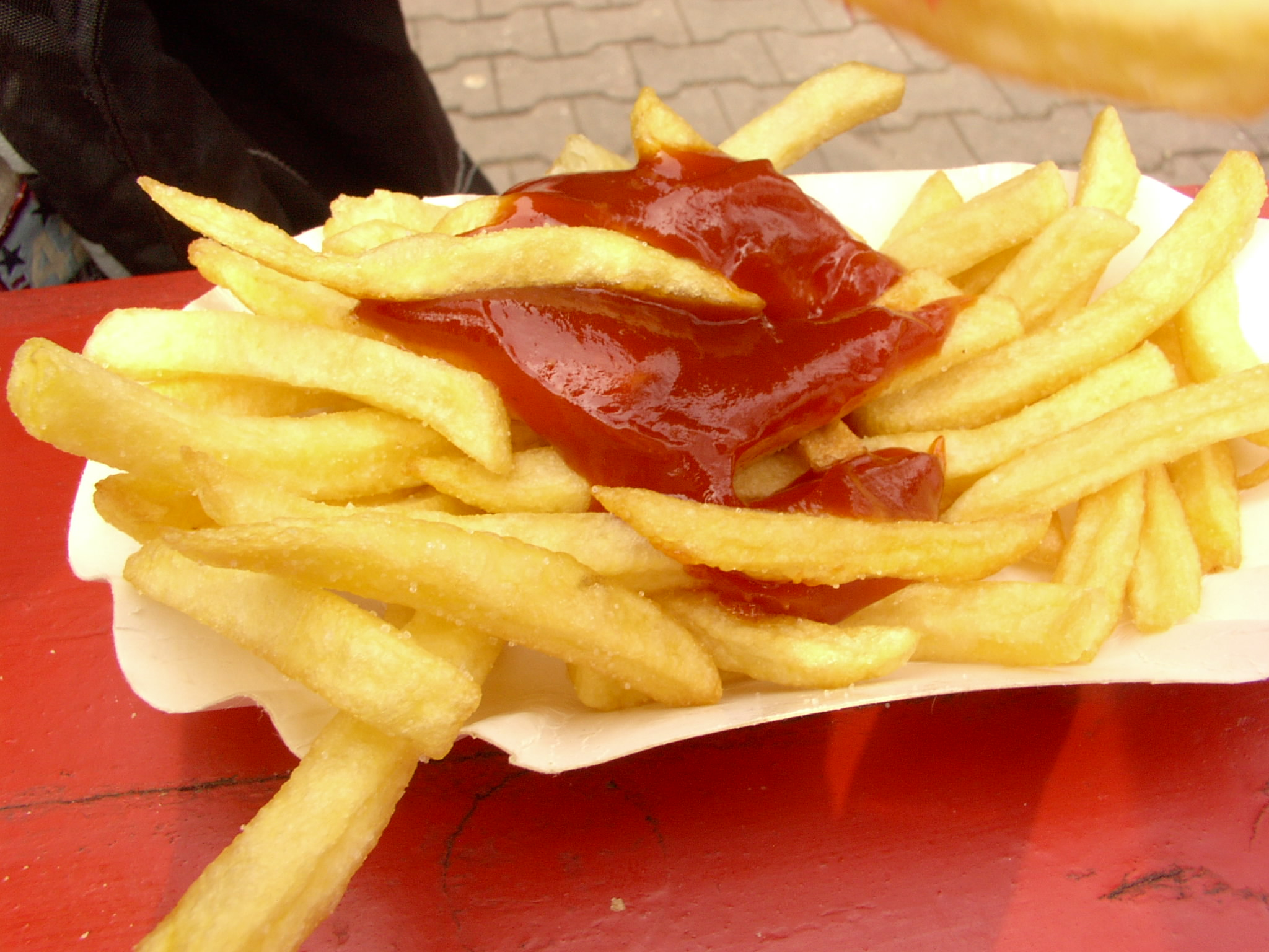 Pommes frites mit Ketschup - eigene Aufnahme